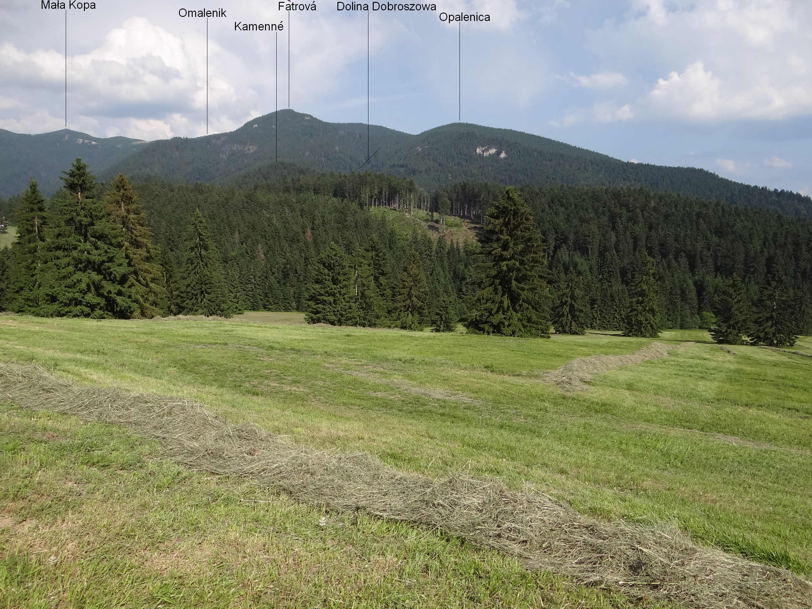 Widok na Dolinę Guniowąz północno-zachodniej strony (z szosy Matiaszowce - Zuberzec